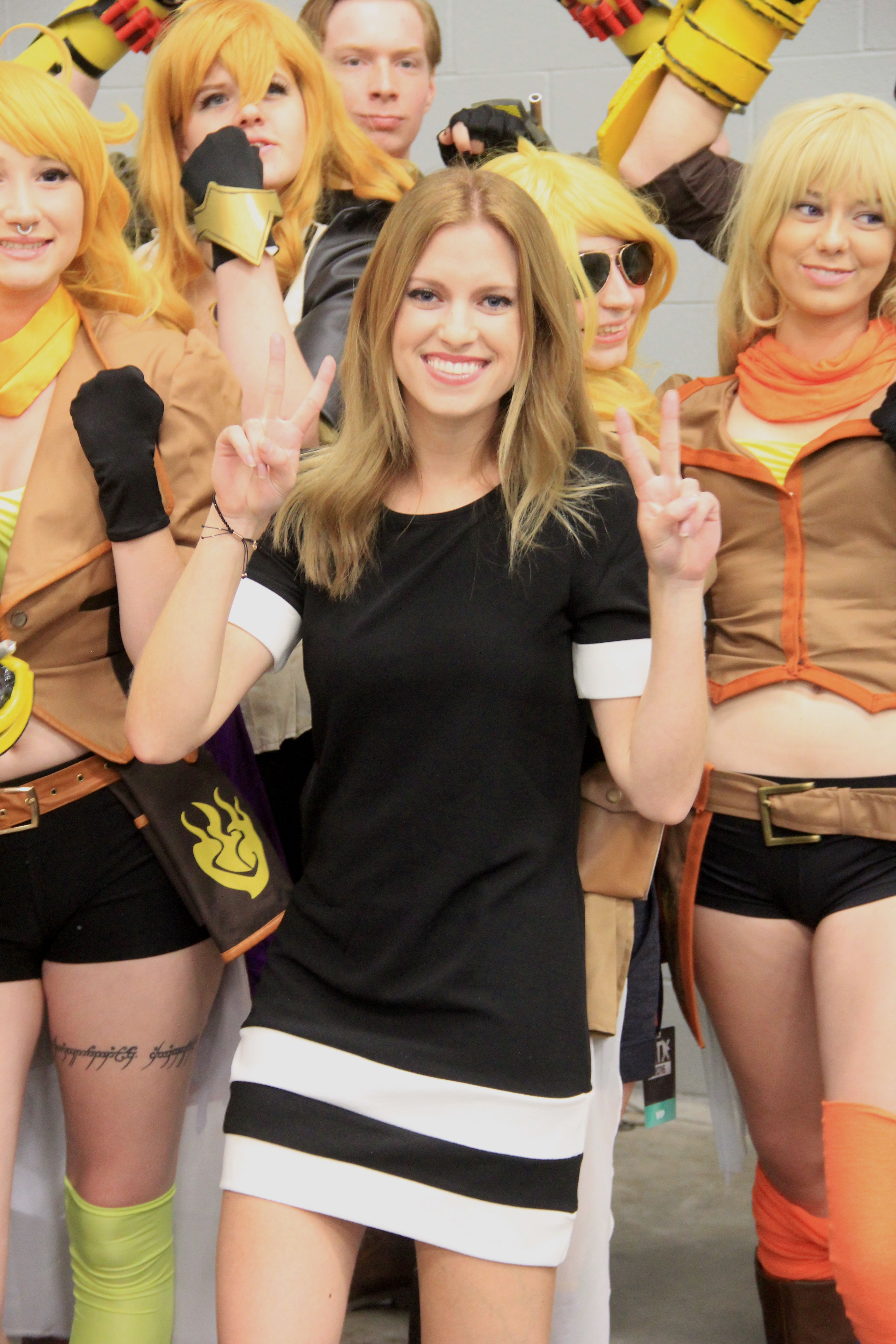 IMG_7948 Taken at RTX 2016.